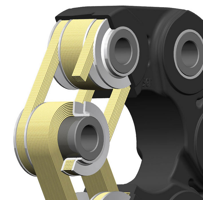 Schnitt durch eine Antriebsgelenkscheibe